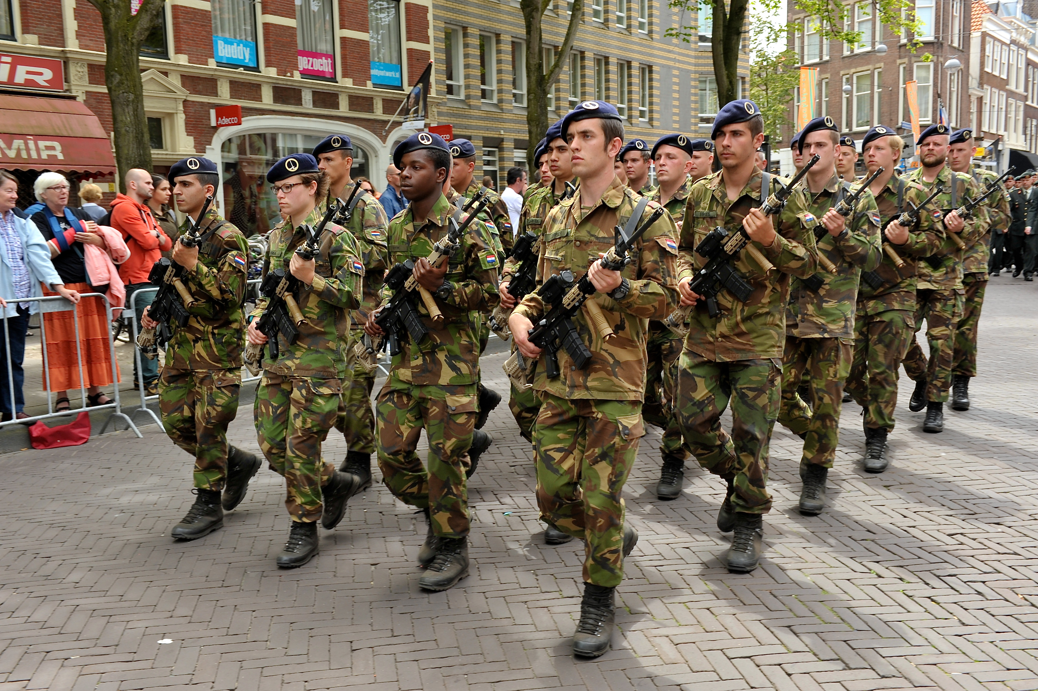 HQ 1 (GE/NL) Corps (Eerste Duits-Nederlandse Legerkorps). Een NAVO defensie-eenheid, bestaande uit Duitse en Nederlandse landmachteenheden. Het hoofdkwartier is gevestigd in de Duitse stad Münster.